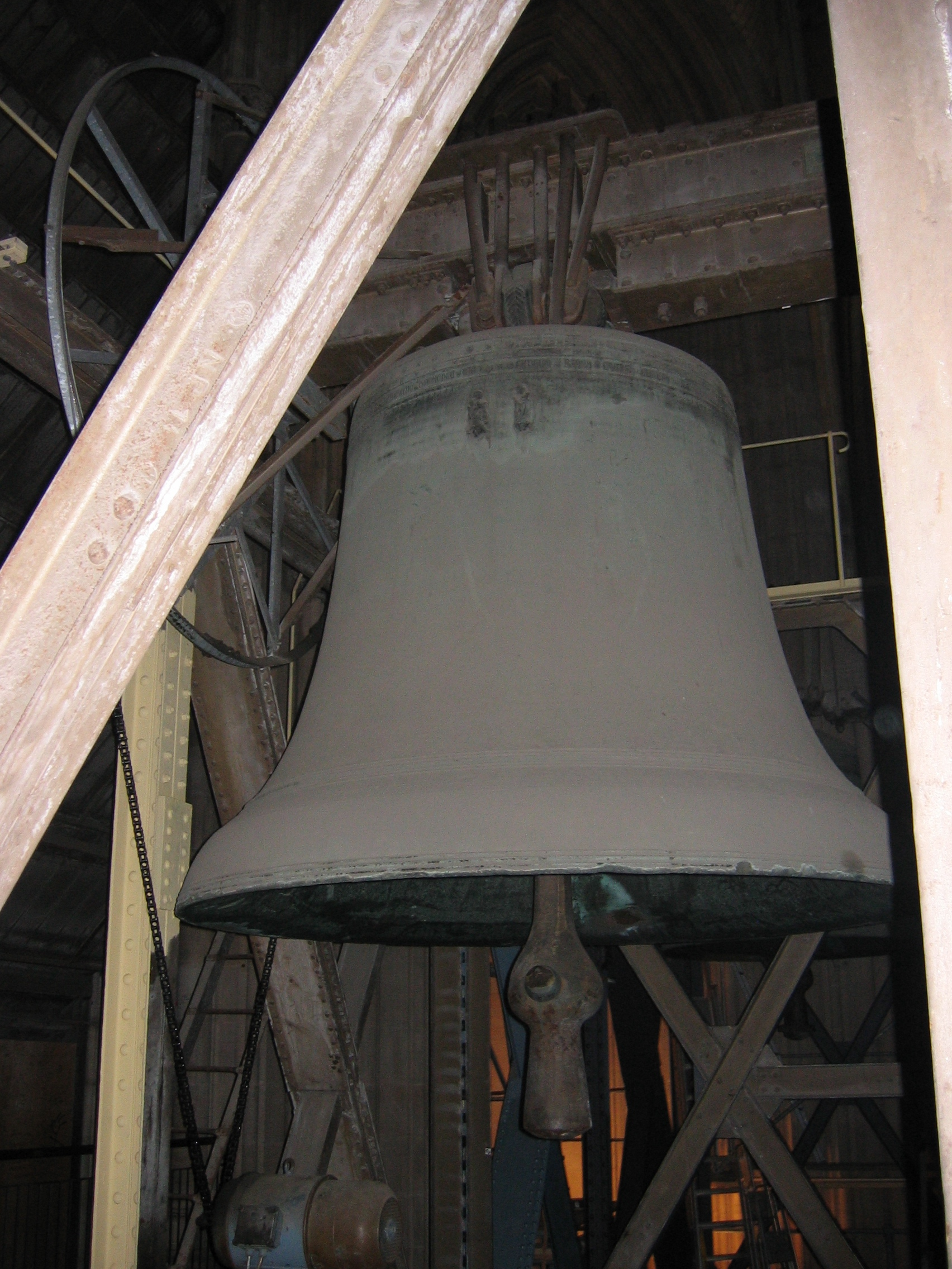 Description – Pretiosa. Zweitgrößte Glocke des Kölner Domes. Source – own work Date – Sommer 2006. Author – Andreasdziewior